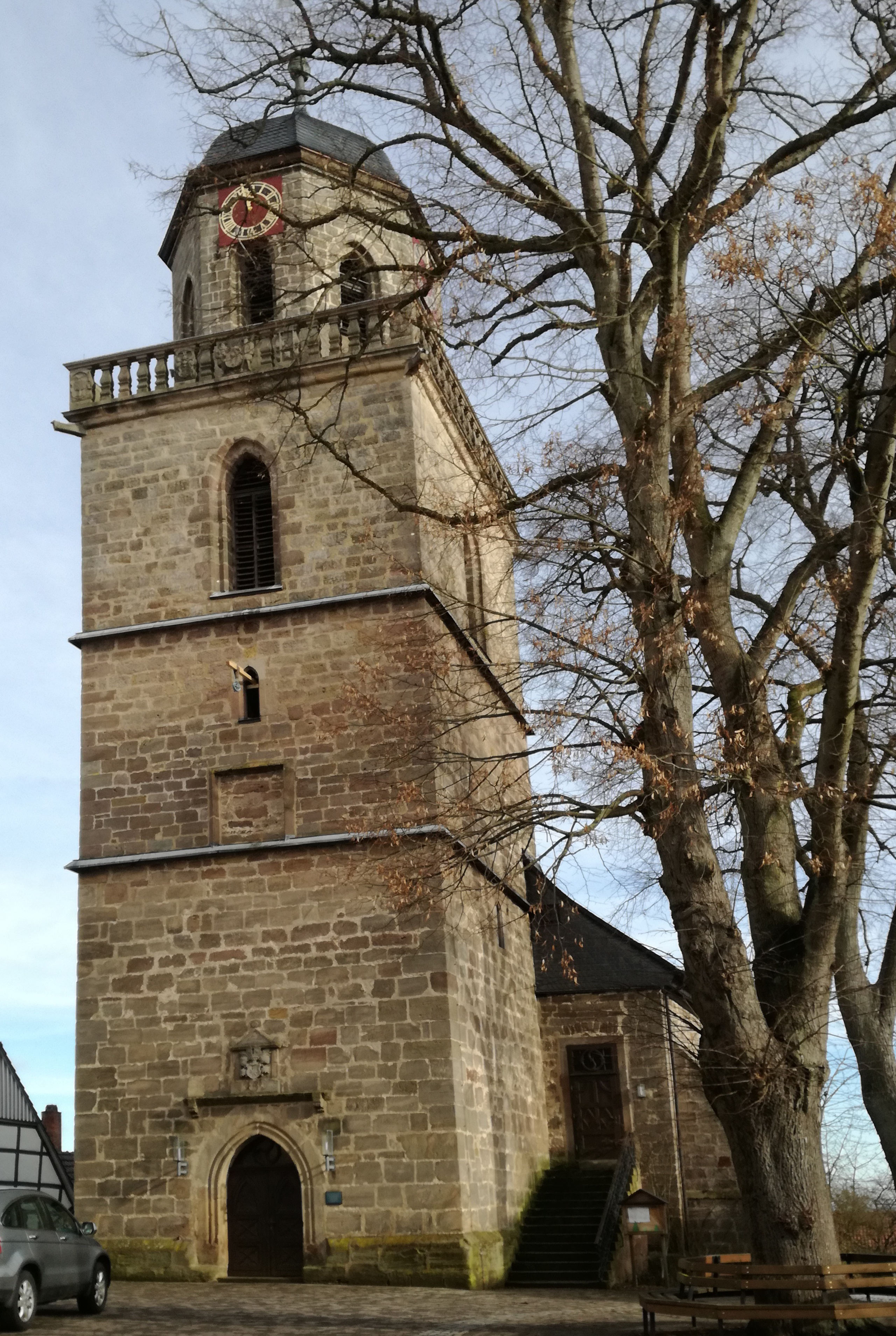 Ostansicht